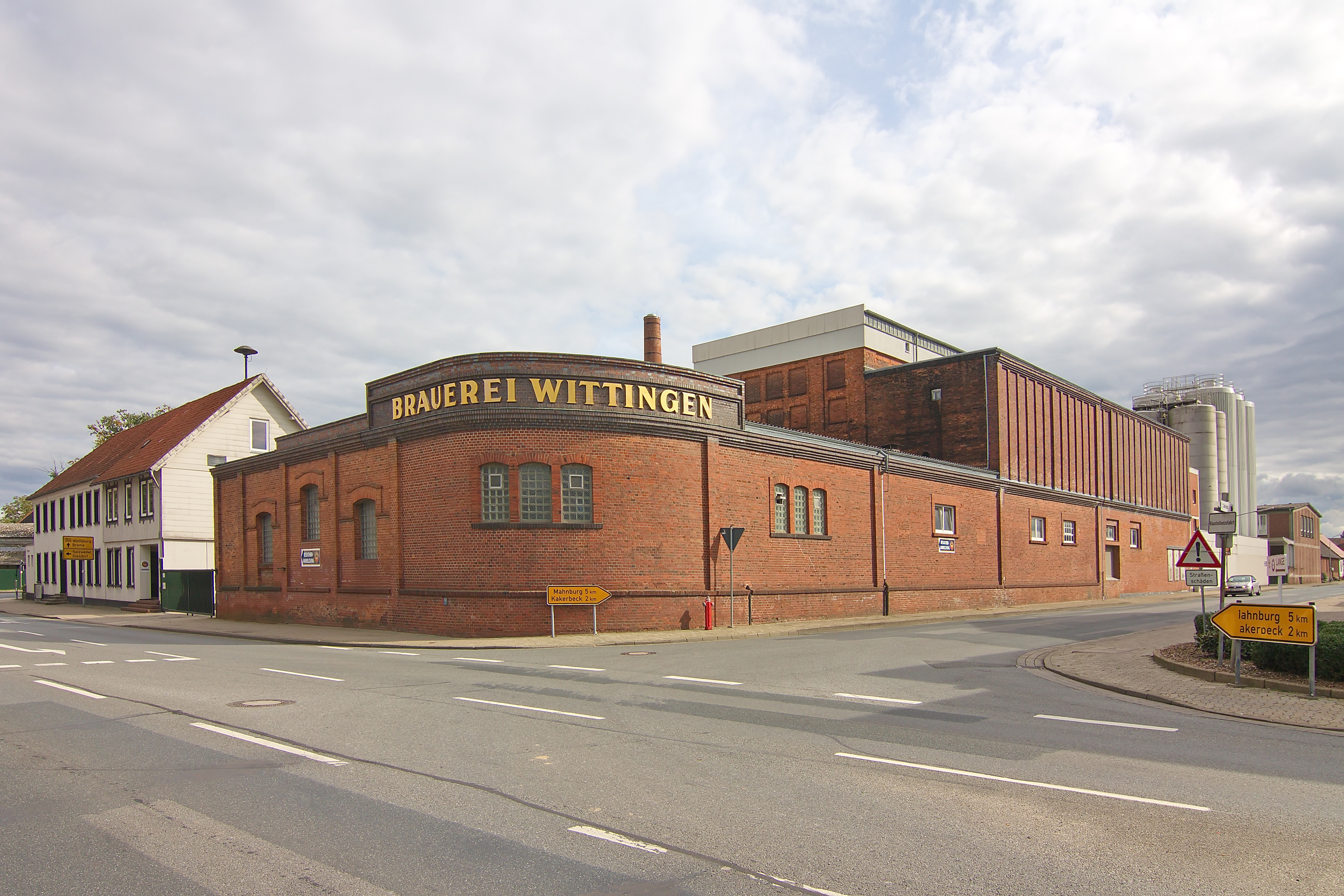 Otsblick in der Altstadt von Wittingen, Niedersachsen, Deutschland